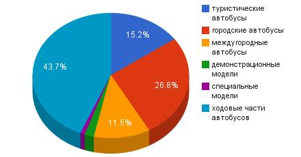 Производство Neoplan за 2006 финансовый год